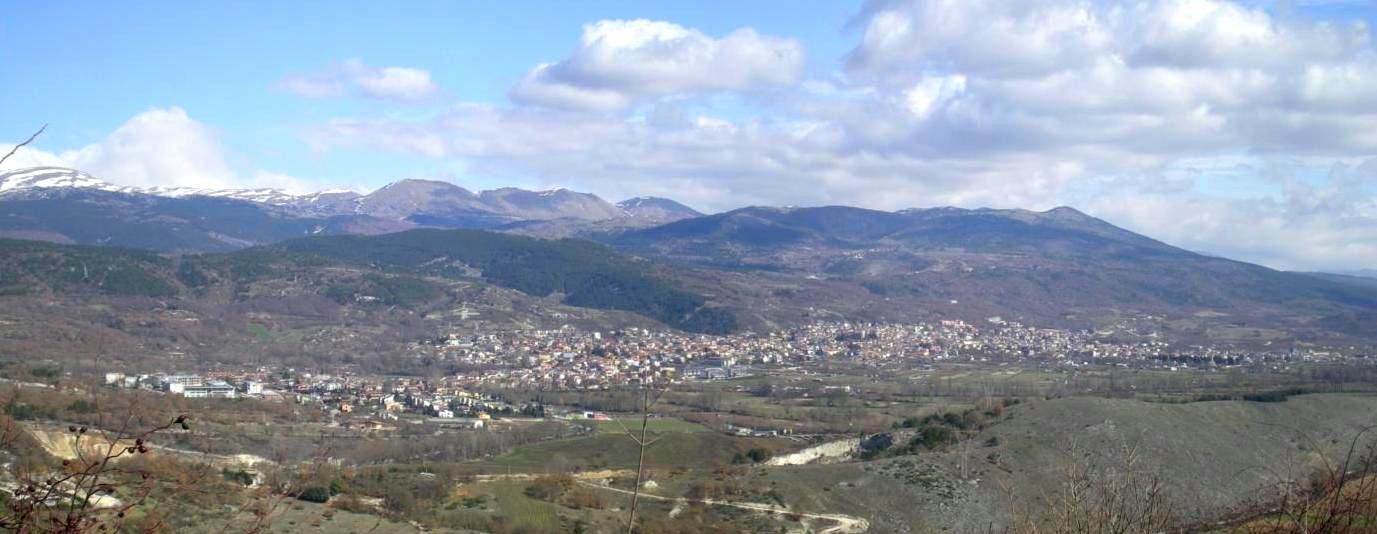 Panoramica dell'agglomerato di Tempera (a sinistra) e Paganica (a destra), frazioni dell'Aquila